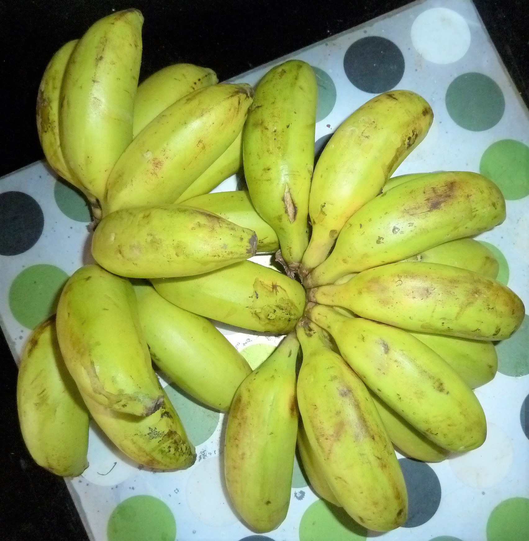 చక్రకేళీ